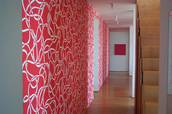 Petr Kvíčala - Byt arch. Ivana Kolečka, Lausanne.